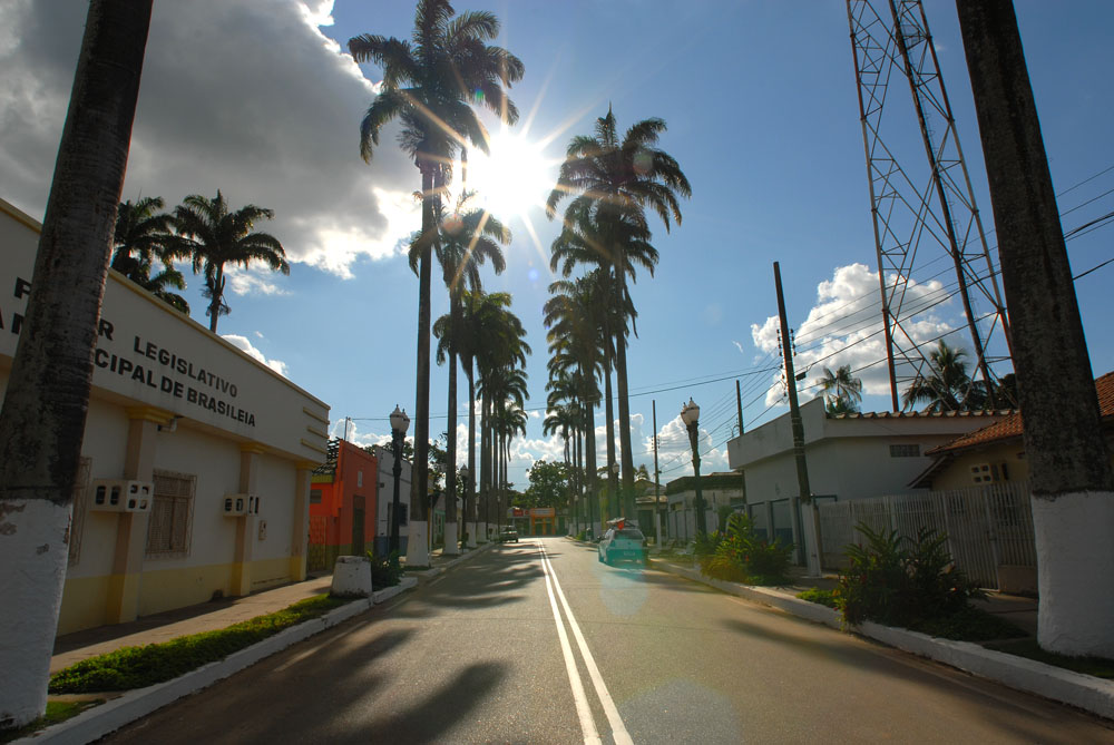 Rua das Palmeiras - Brasiléia